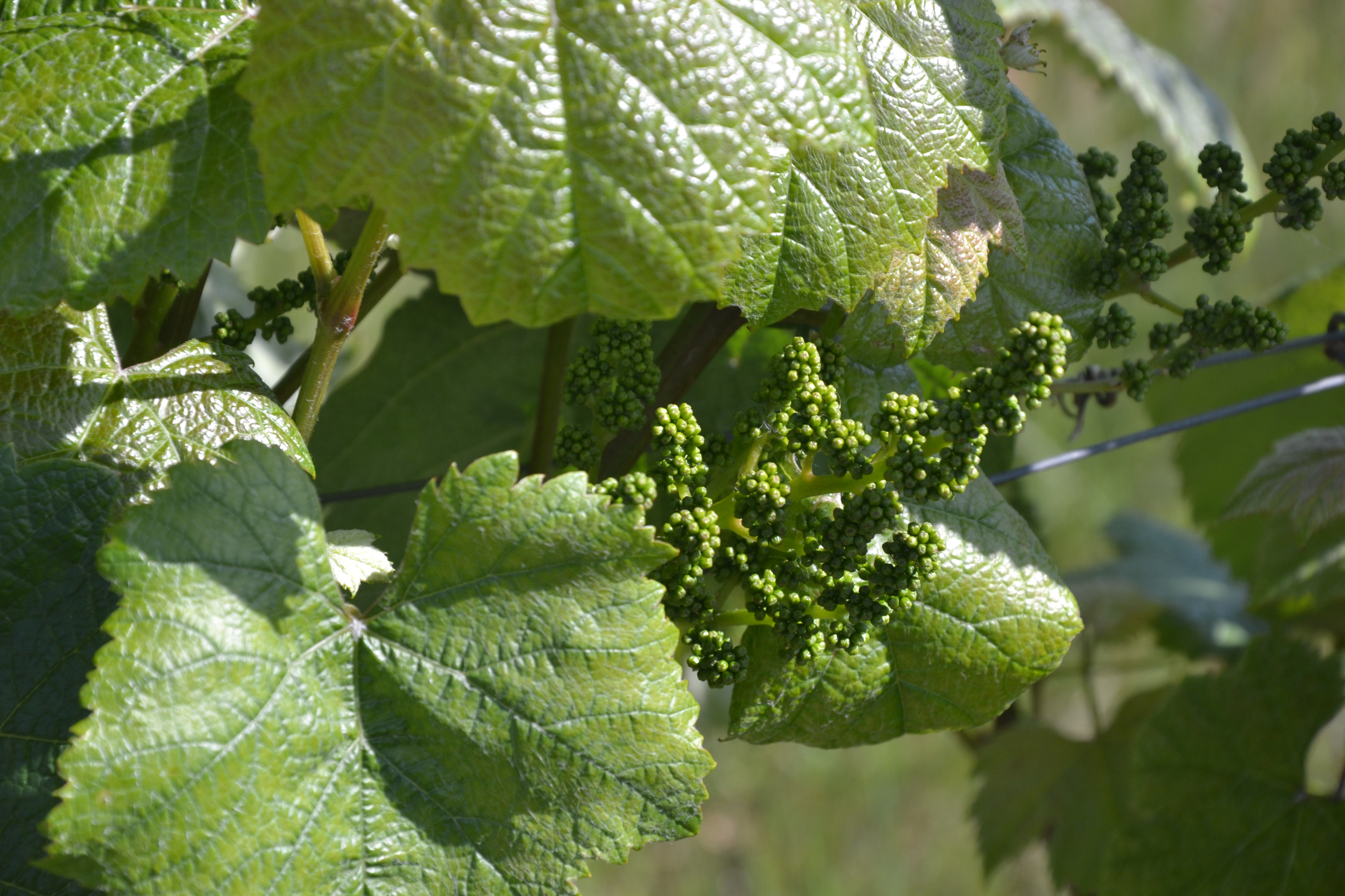 Formation d'une grappe dans une vigne de l'AOC Pacherenc-du-vic-bilh